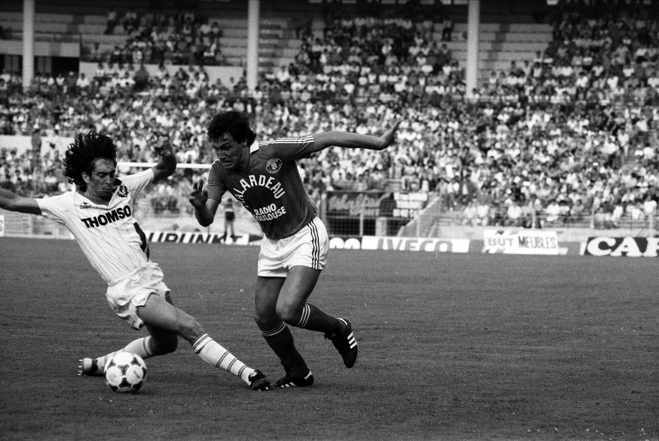 Stadium municipal de Toulouse, 1bis allées Gabriel-Biénès. 16 juillet 1985. L'équipe du Toulouse Football Club rencontre l'équipe de Nancy. Cliché pris durant le match. Au 1er plan action de jeu (tacle) ; en arrière-plan gradins avec spectateurs.